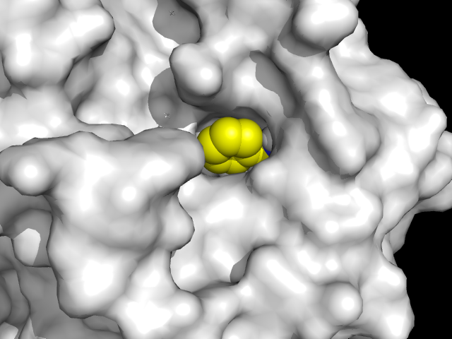 Benzamidin dokkolása humán trombin fehérjéhez